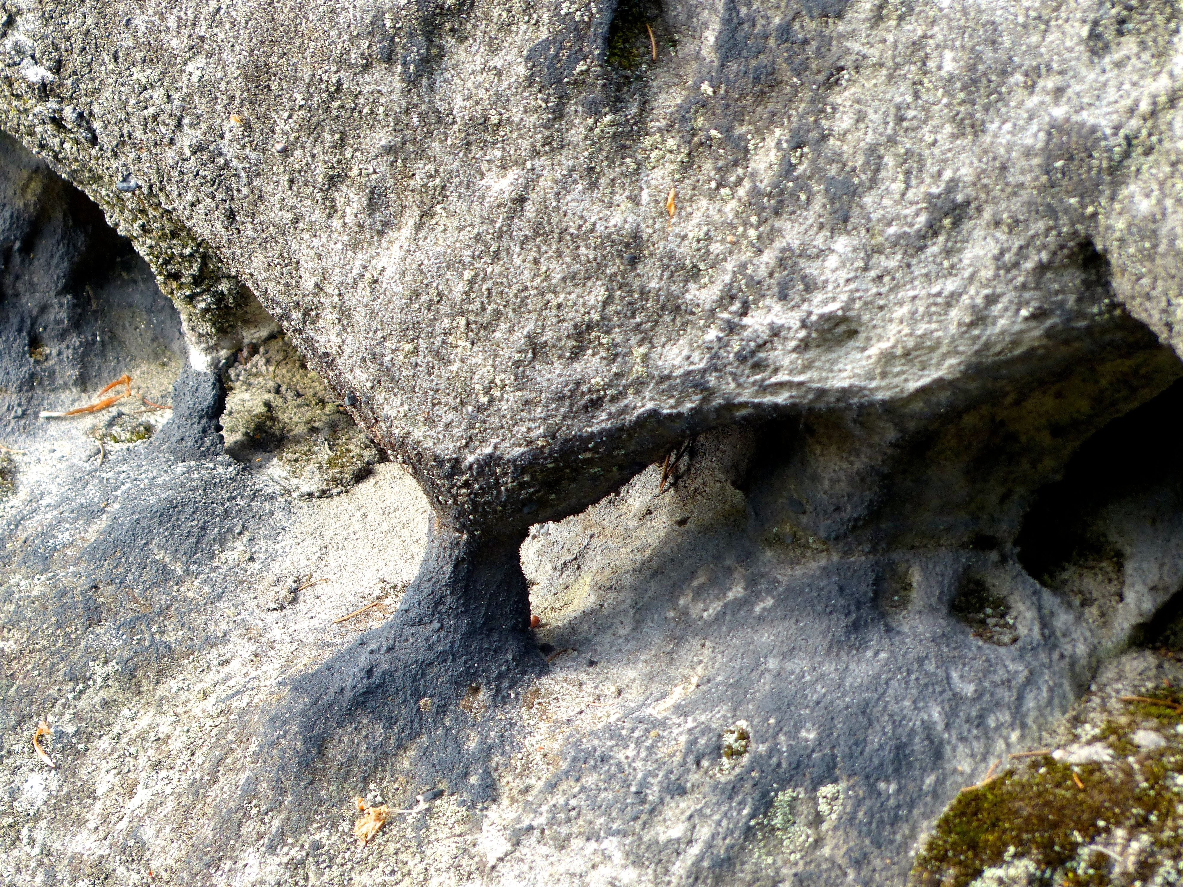 Nationalpark Sächsische Schweiz: Sandsteinorgel (Verwitterung im Sandstein)